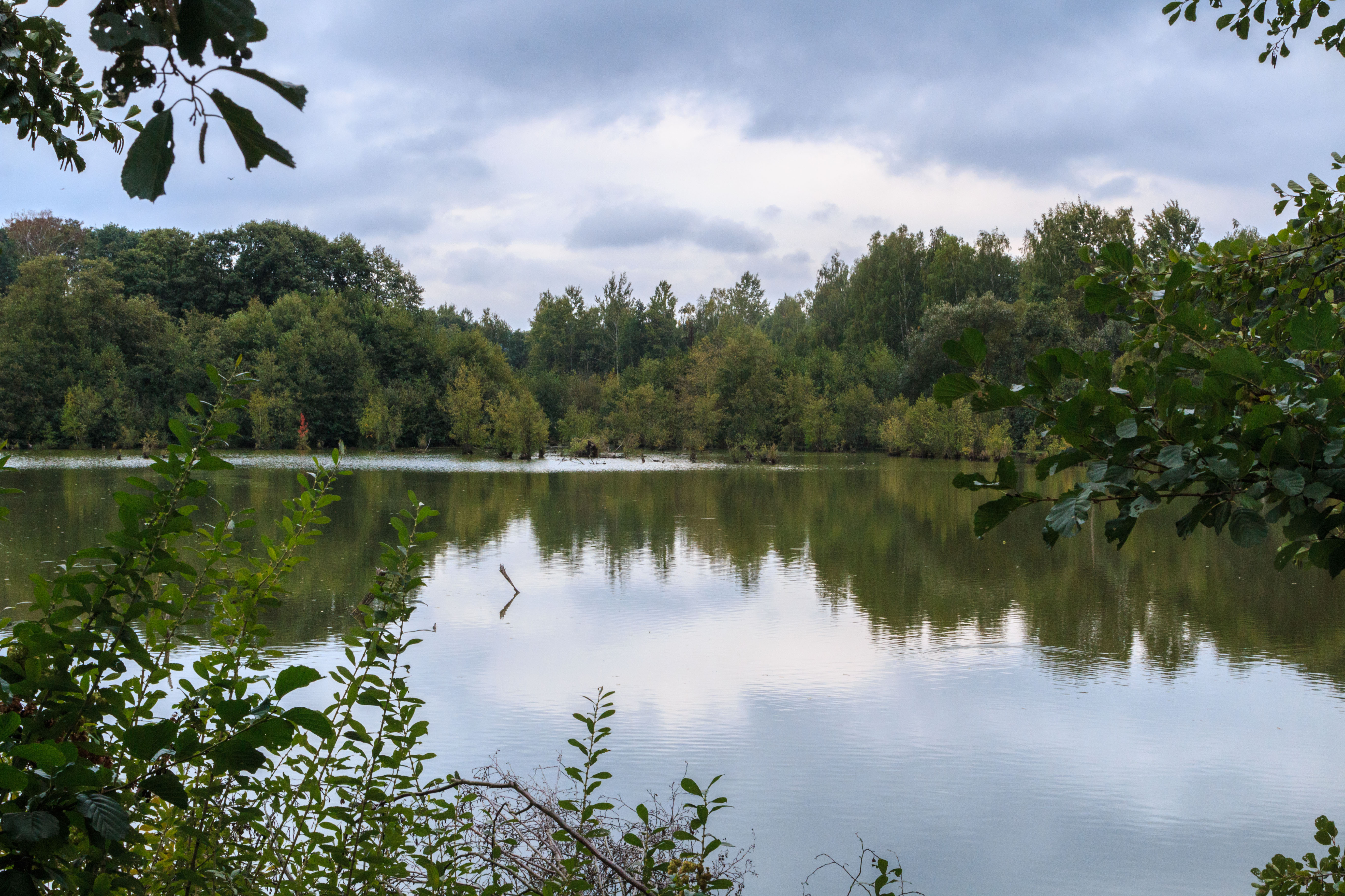 Rybník Mokřad Project: Vodstvo.